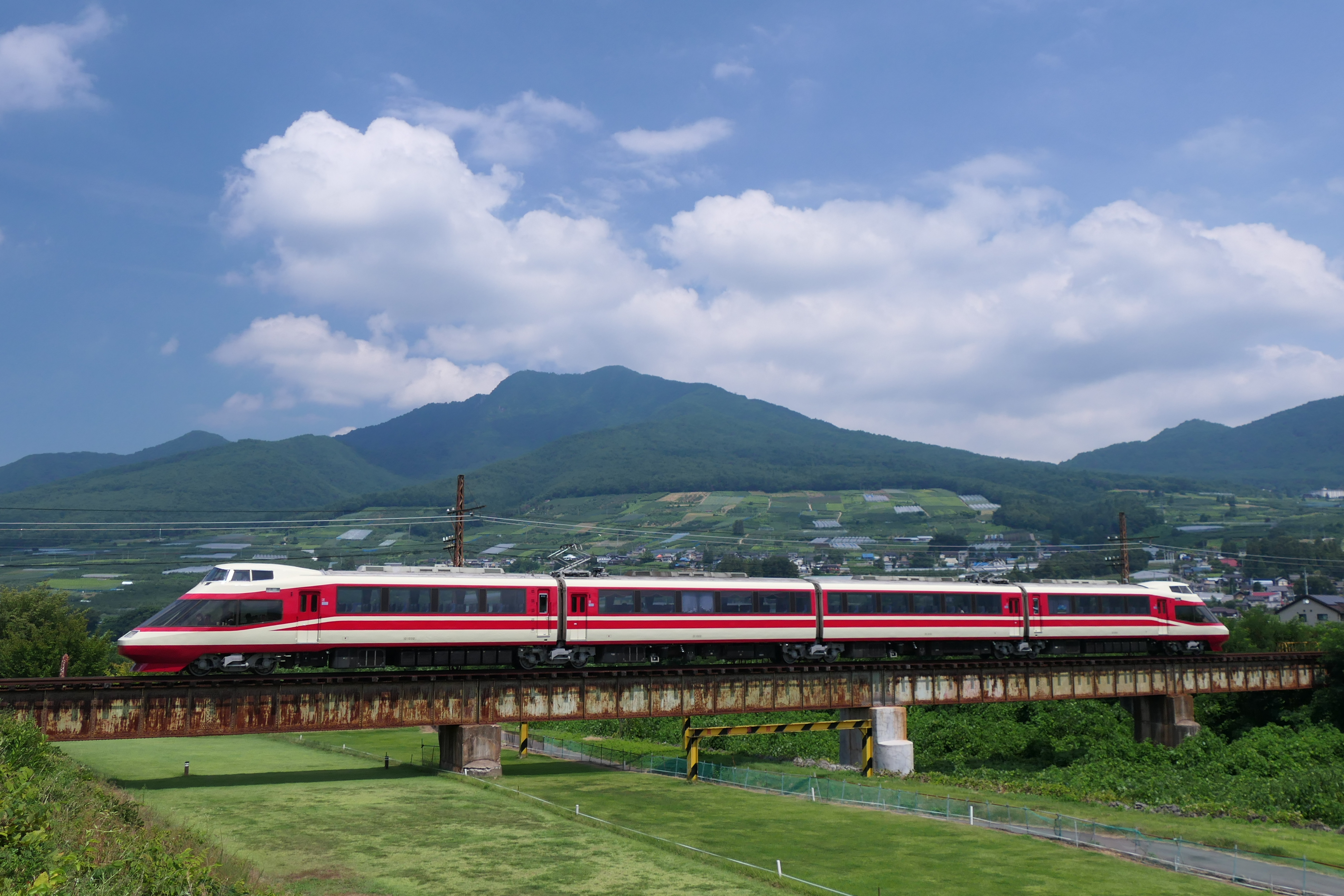 長野電鉄長野線を走行する1000系電車ゆけむり号